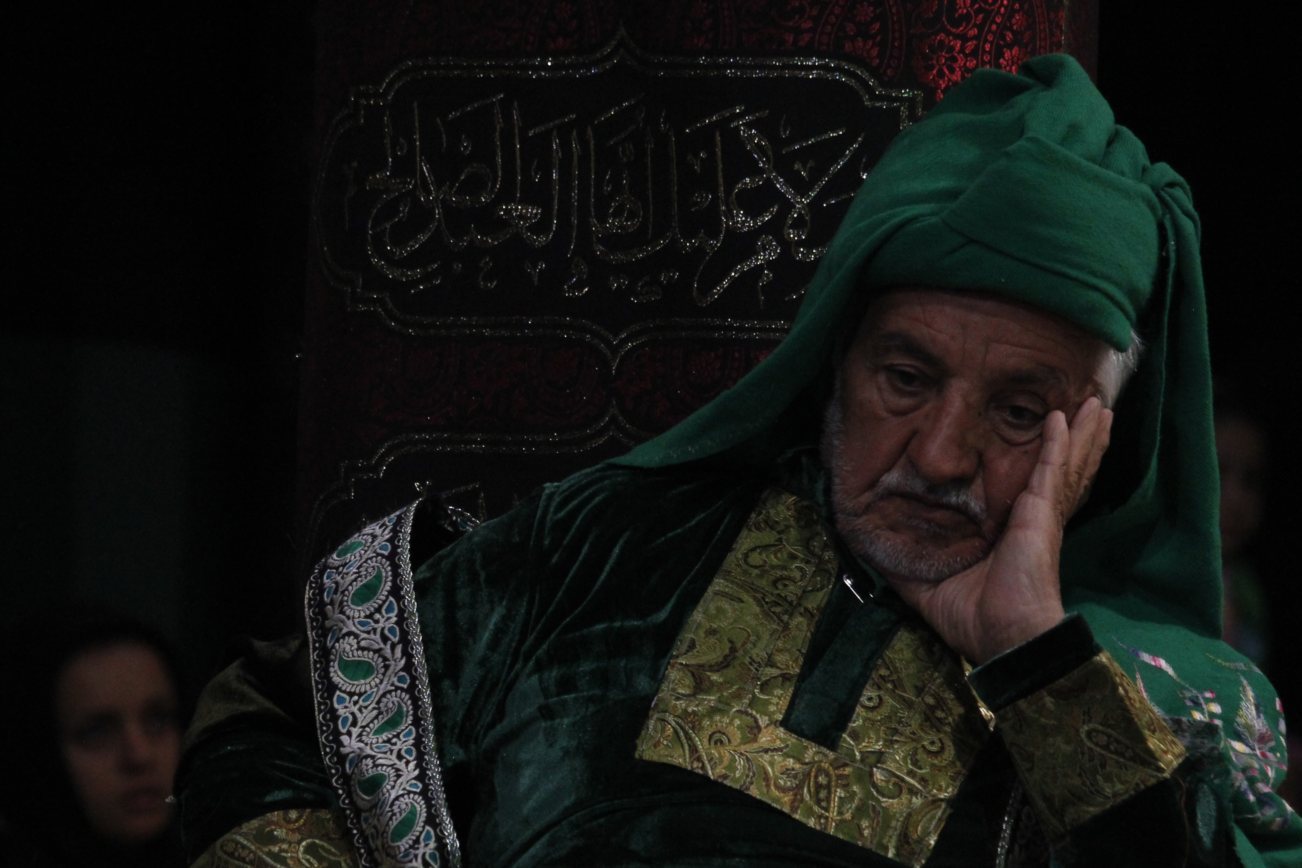 استاد دکتررضا حیدری- بهترین تعزیه خوان ایران- تفرش